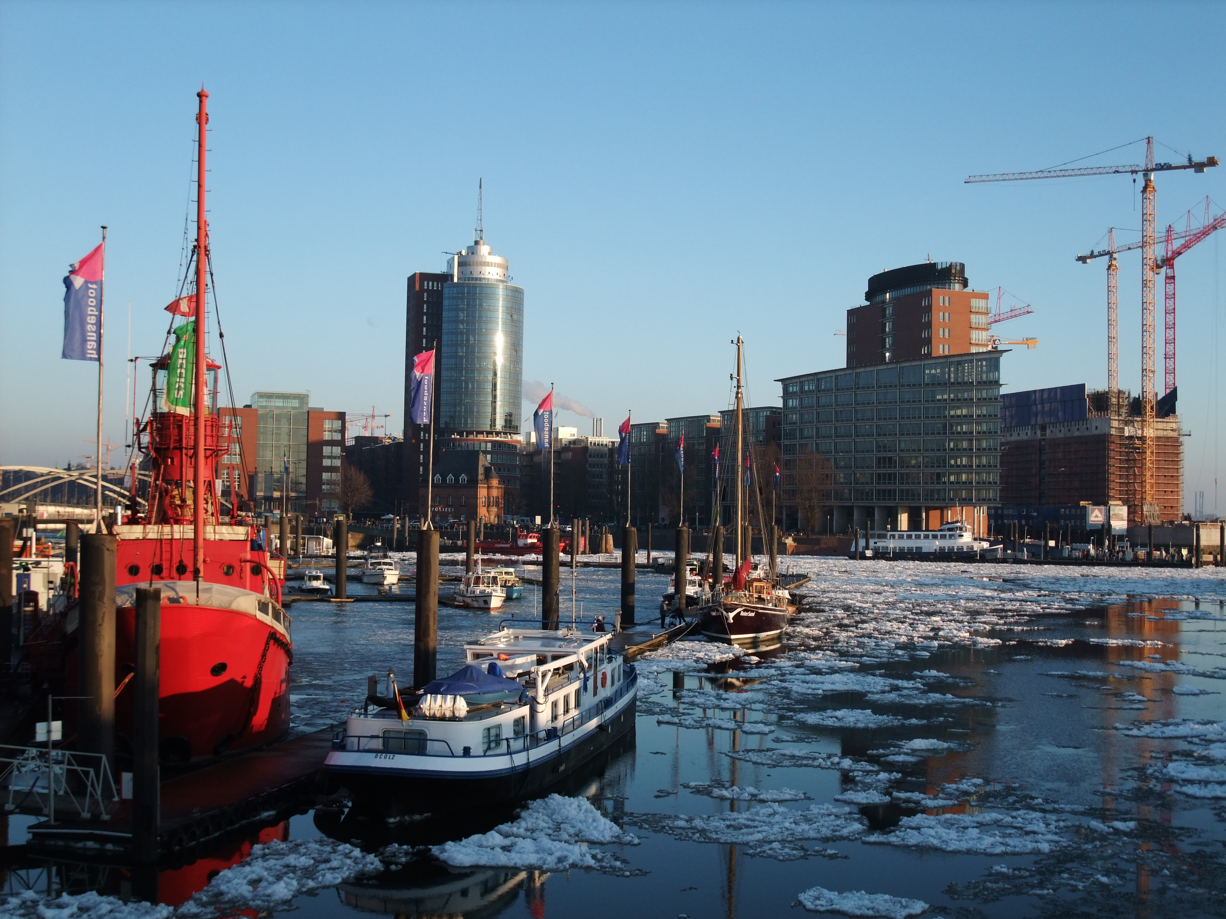 Hamburg harbour Jan2009